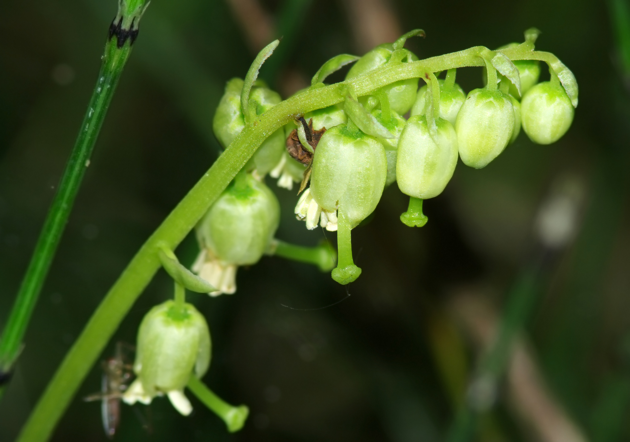 Gruszynka jednostronna, gruszkówka jednostronna, gruszyczka jednostronna (Orthilia secunda)